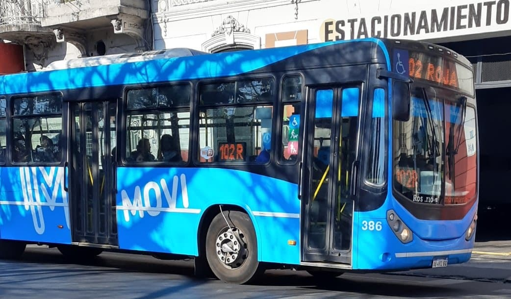 Interno 386 afectado a la línea 102 variante "roja", de la empresa Movi.